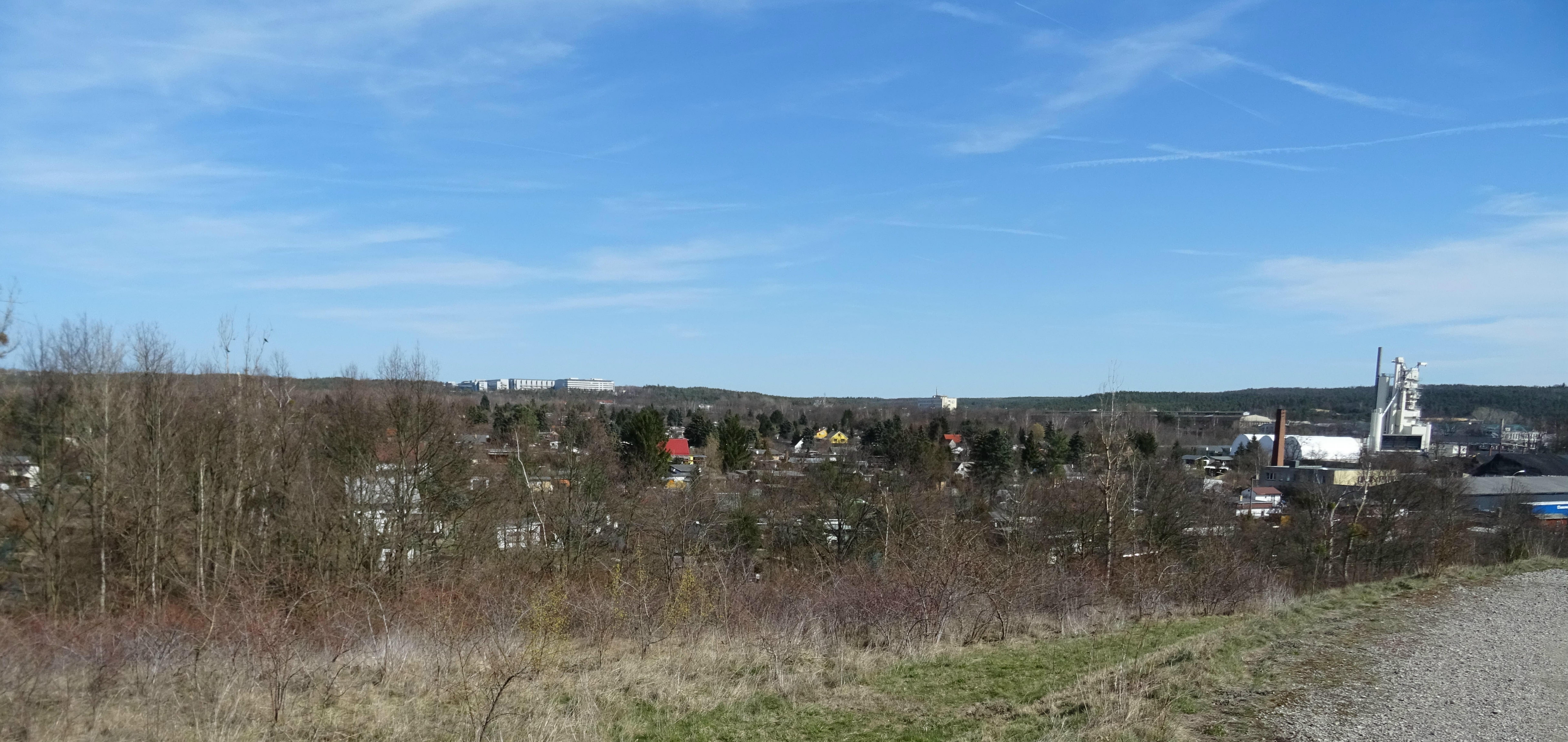 Hellerberge, Hellersiedlung am 16. März 2019